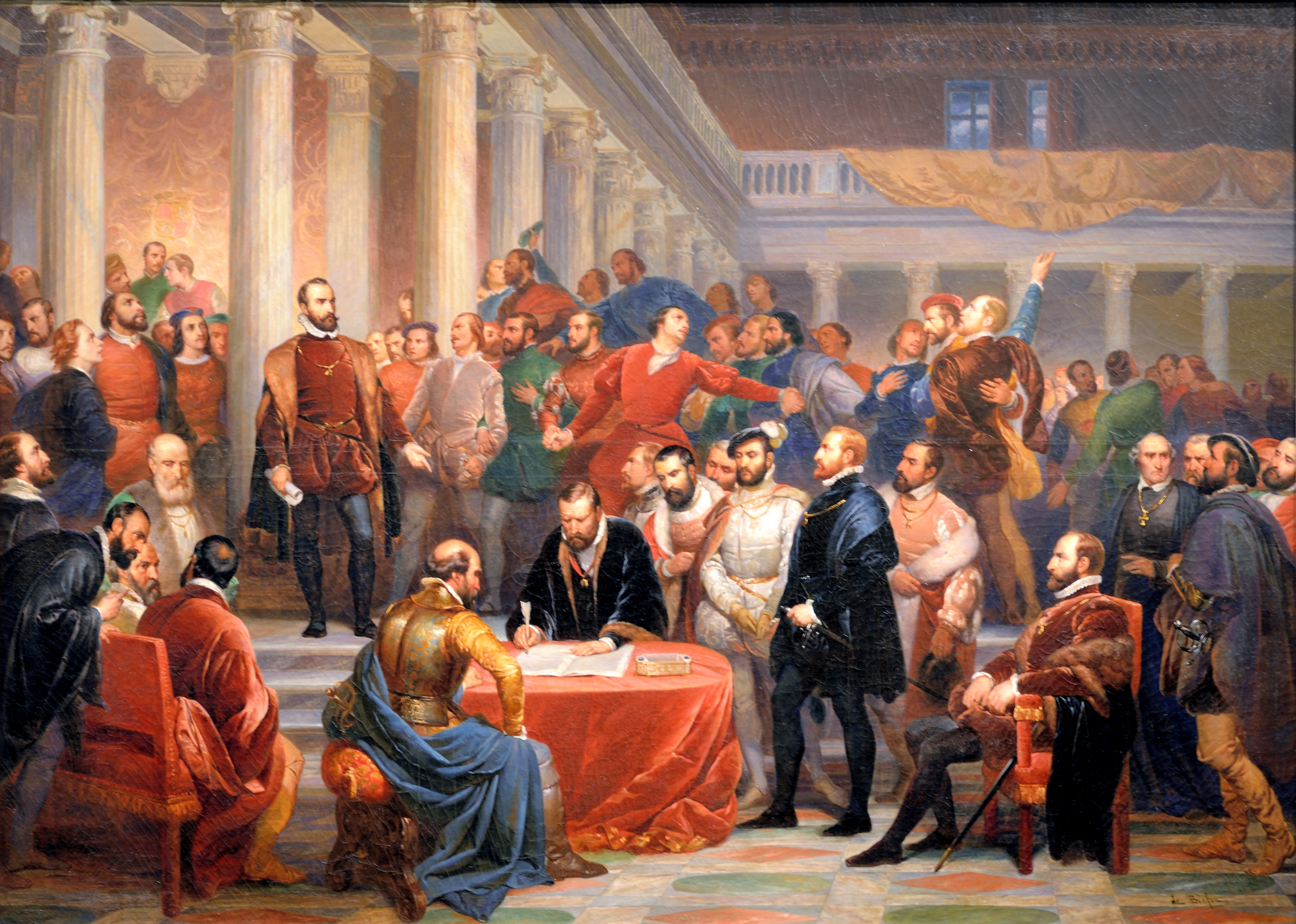 Le Compromis des nobles en 1566., Huile sur toile peinte par Édouard de BIEFVE (1808-1880). Réplique 1849, œuvre exposée au Musée de beaux-arts de Lyon en 2014.